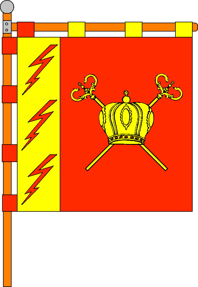 Прапор міста Миколївка